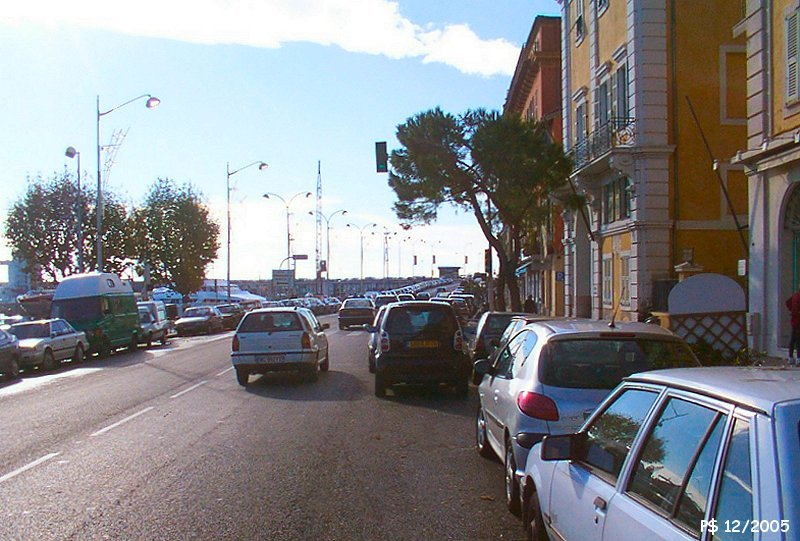 Le Quai de la Douane en direction du sud.